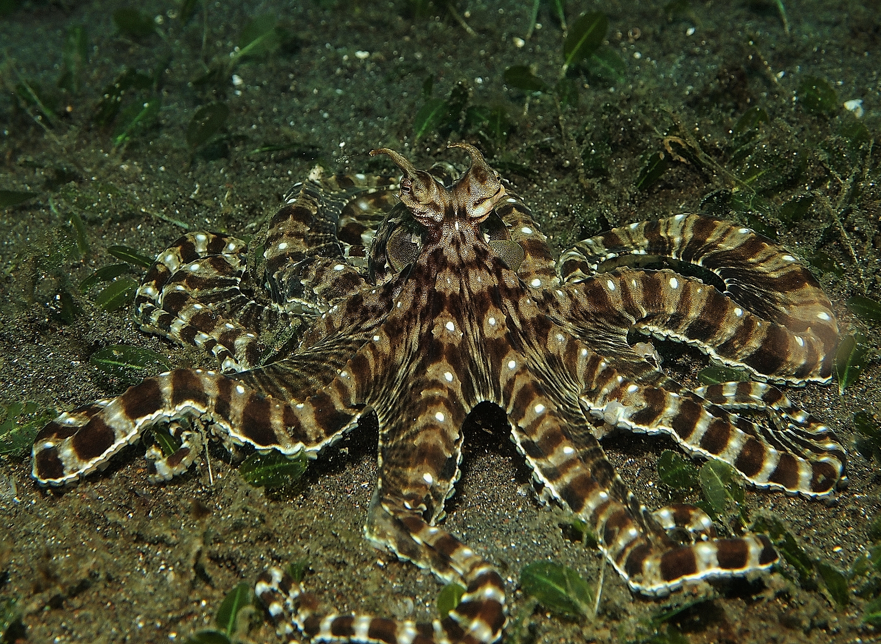 Mimic Octopus